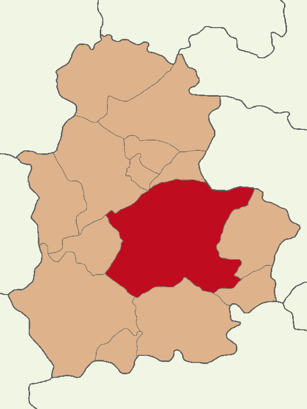 Çorum Merkez ilçesinin konumu